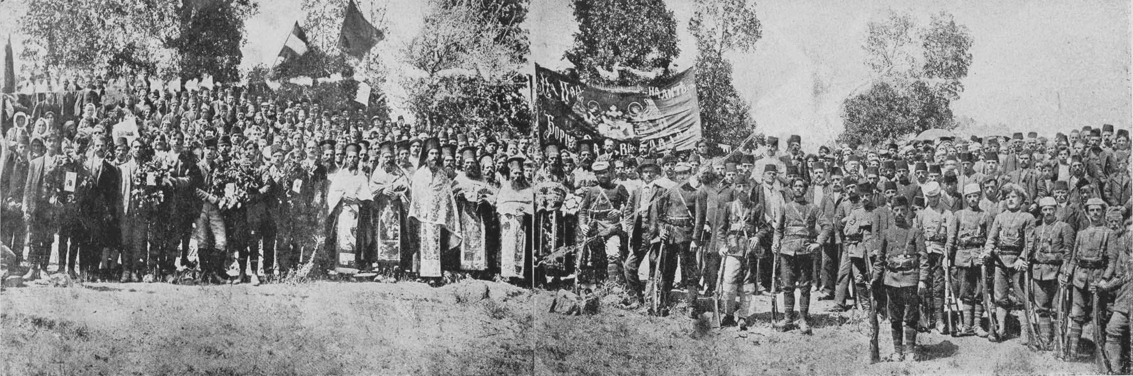 Поклонение на братската могила на загиналите дейци на ВМОРО при с. Апоскеп, Костурско, 1908 г. Присъстват костурските войводи Васил Чекаларов и Пандо Сидов, свещенникът Герман от с. Черешница, представители на младотурската власт, духовници, роднини на убитите и други.